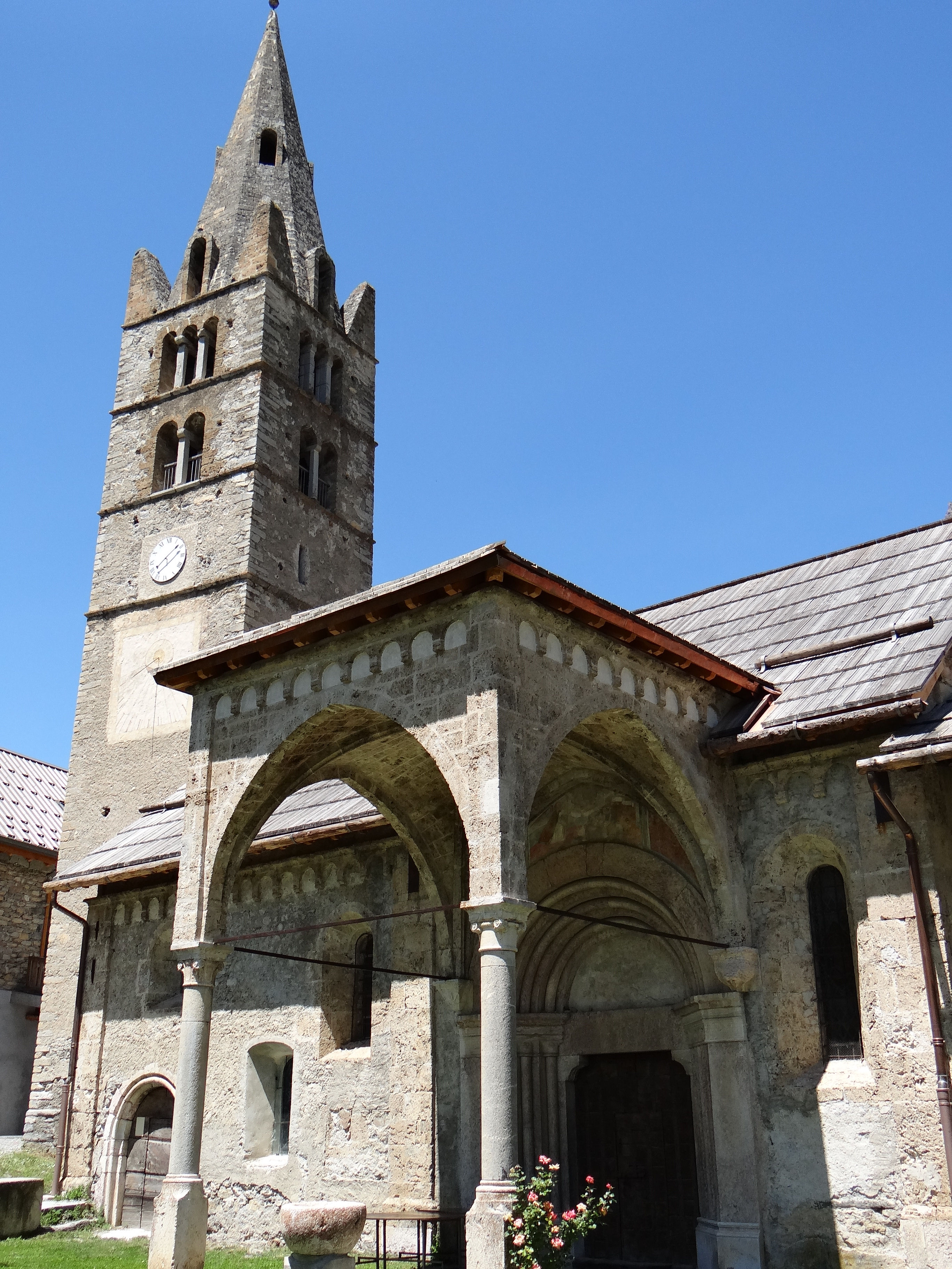 Les Vigneaux - Église Saint-Laurent - Le porche et le clocher